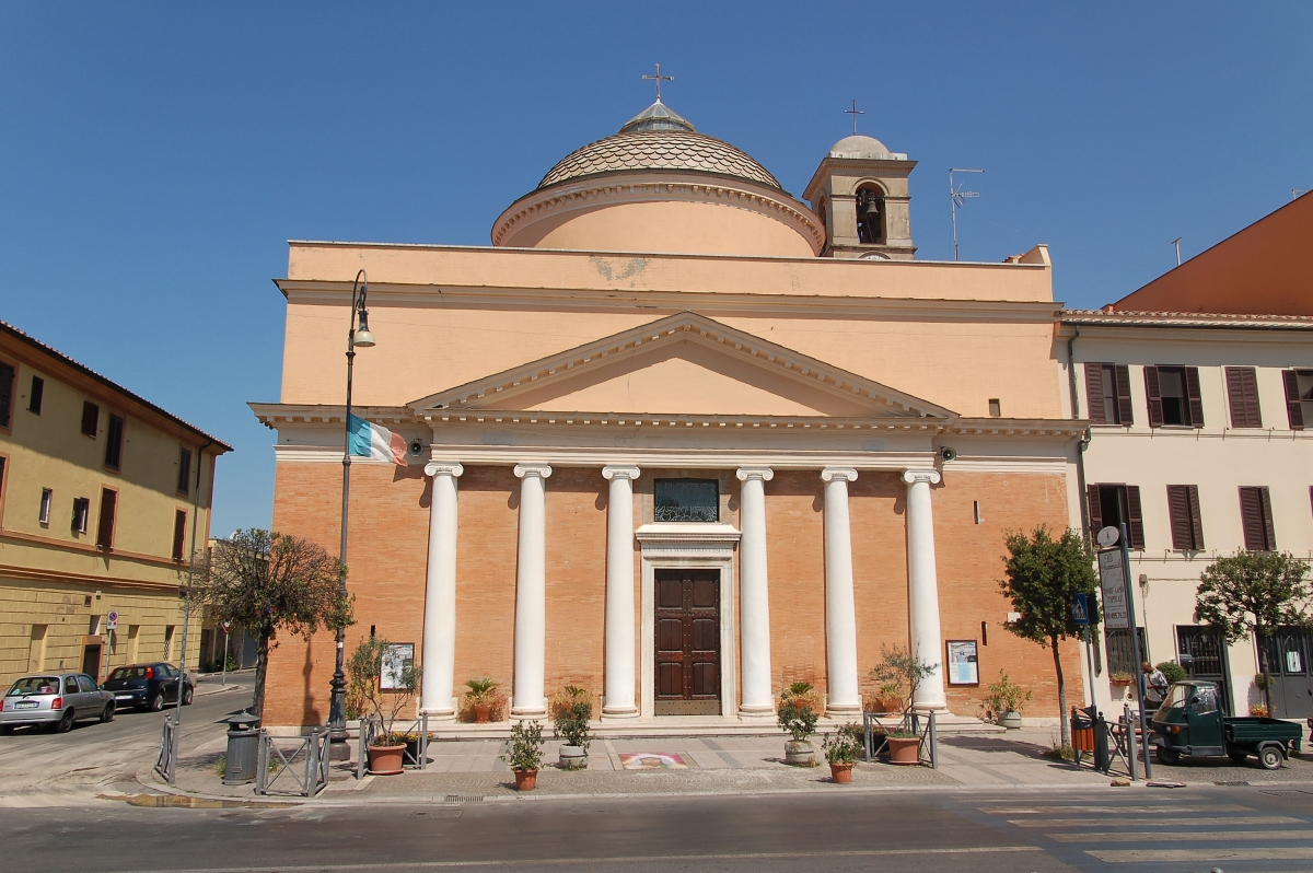 Fiumicino 2011 Durch die Übernahme der UMTS Kosten durch den gemeinnützigen Vereins Skillshare.eu konnte dieses Bild bereitstellen werden. Skillshare e.V. ist ein eingetragener gemeinnütziger Verein zur Förderung der Bildung durch Unterstützung der Erstellung, Sammlung und Verbreitung so genannten freien Wissens. IBAN: DE16 8306 5408 0004 8850 66 BIC: GENODEF1SLR Bank: VR-Bank Altenburger Land